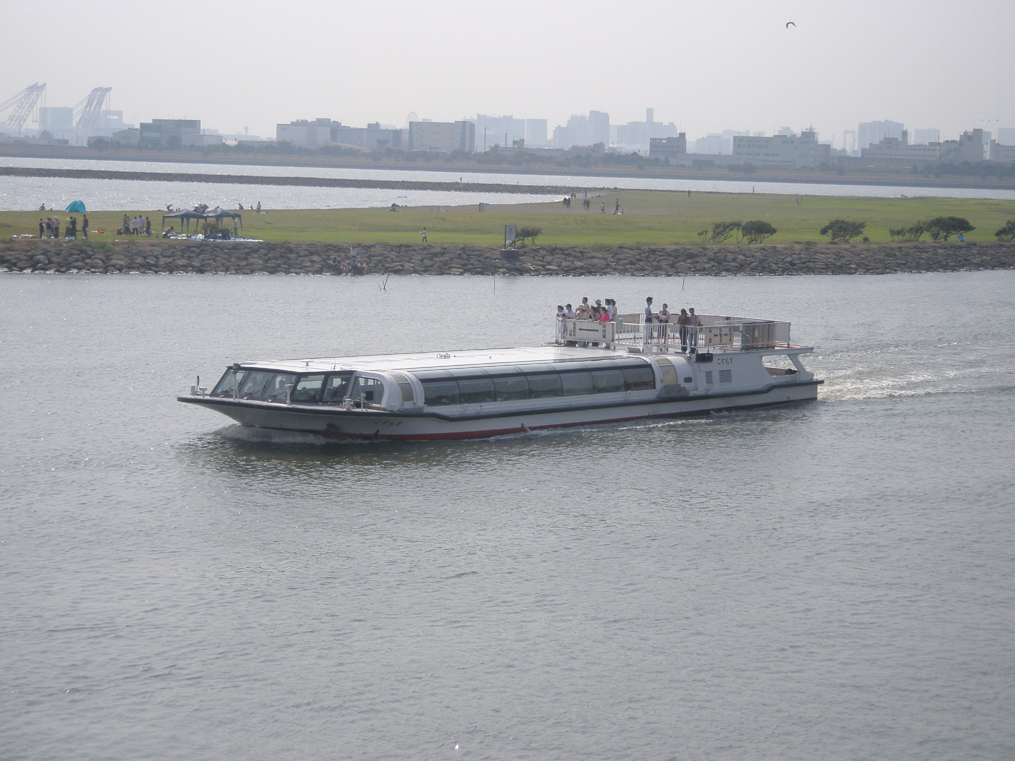 水上バス「こすもす」、葛西臨海公園にて。後ろの渚は葛西海浜公園